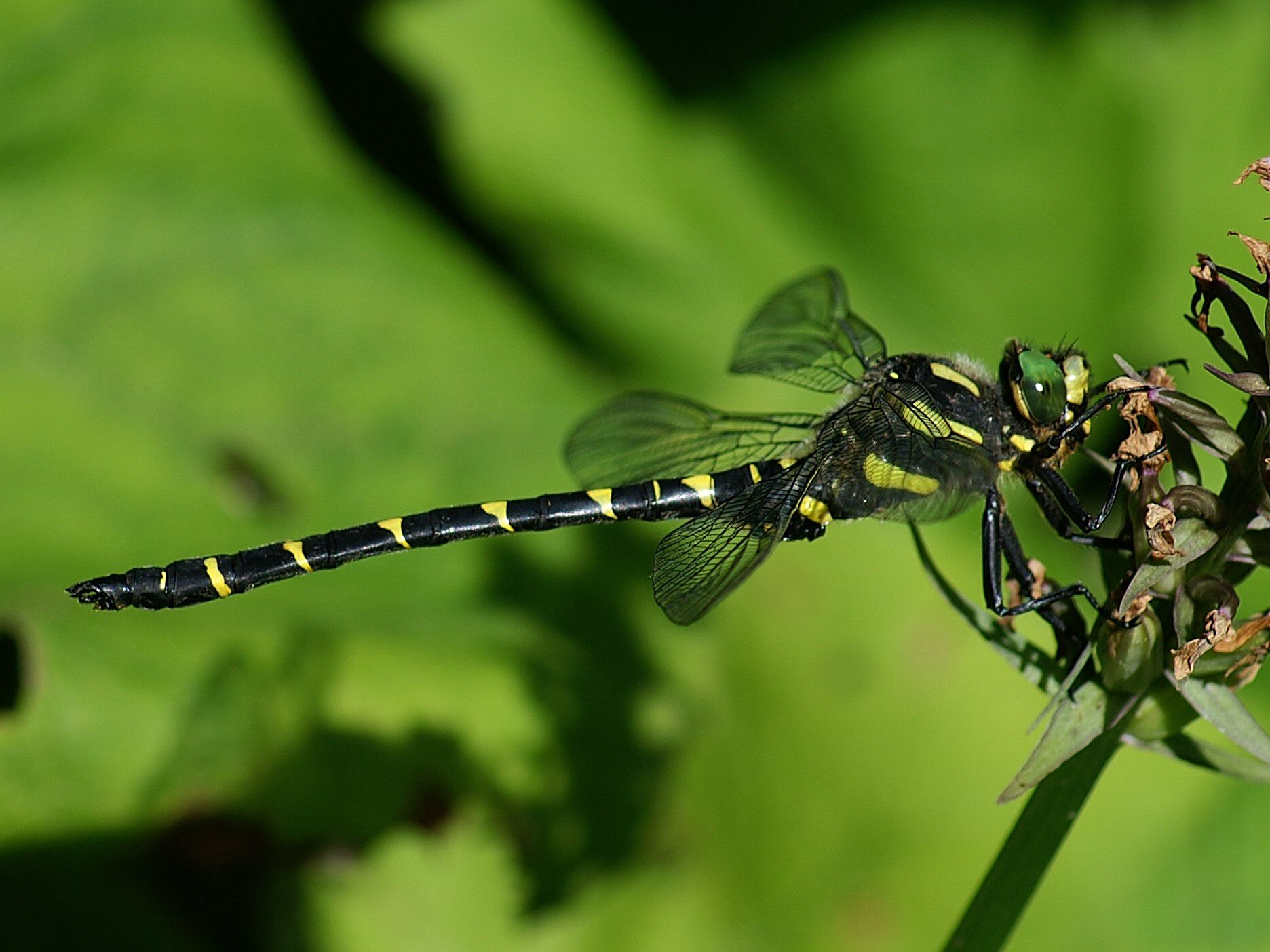 Die Gestreifte Quelljungfer (Cordulegaster bidentata) ist 8 cm lang und hat eine Flügelspannweite von 10 cm. Äußerlich ähnelt diese Quelljungfernart sehr der Zweigestreiften Quelljungfer (Cordulegaster boltonii), doch ist auf dem mittleren Hinterleibsring nur ein Querstreifen und das Hinterhauptdreieck ist nur schwarz. gesehen in der Nähe von Schuttannen in Hohenems.